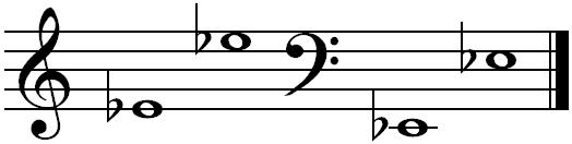 Nuty es na pięciolinii.